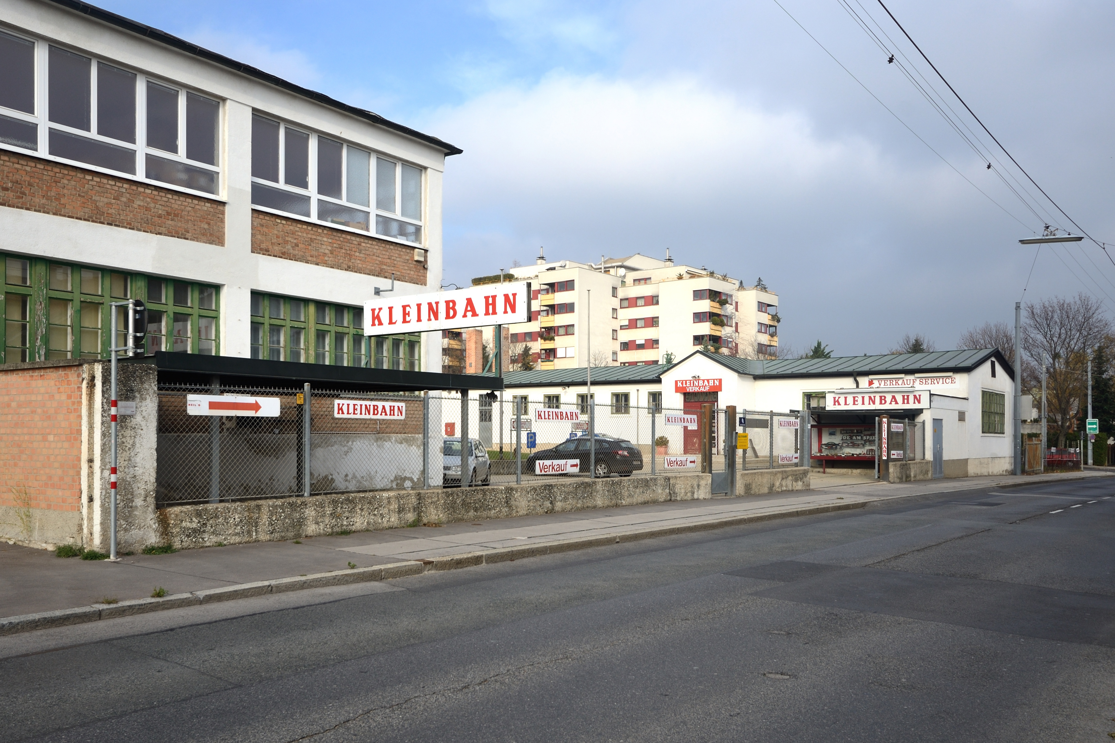 Zentrale der Firma Kleinbahn in der Gatterederstraße 4 in Wien Atzgersdorf.